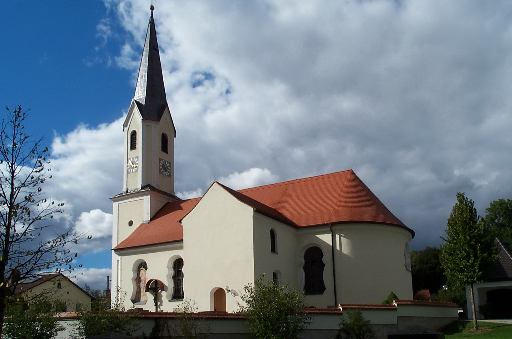 Ergoldsbach, Kläham, Kirchplatz 1. Filialkirche Mariä Heimsuchung und Kapelle. Saalkirche mit eingezogenem Chor und Westturm, Gliederung durch Lisenen und Putzbänderung, Westturm mit Geschossgliederung, achtseitigem Aufsatz und Spitzhelm, erbaut 1747; mit Ausstattung.